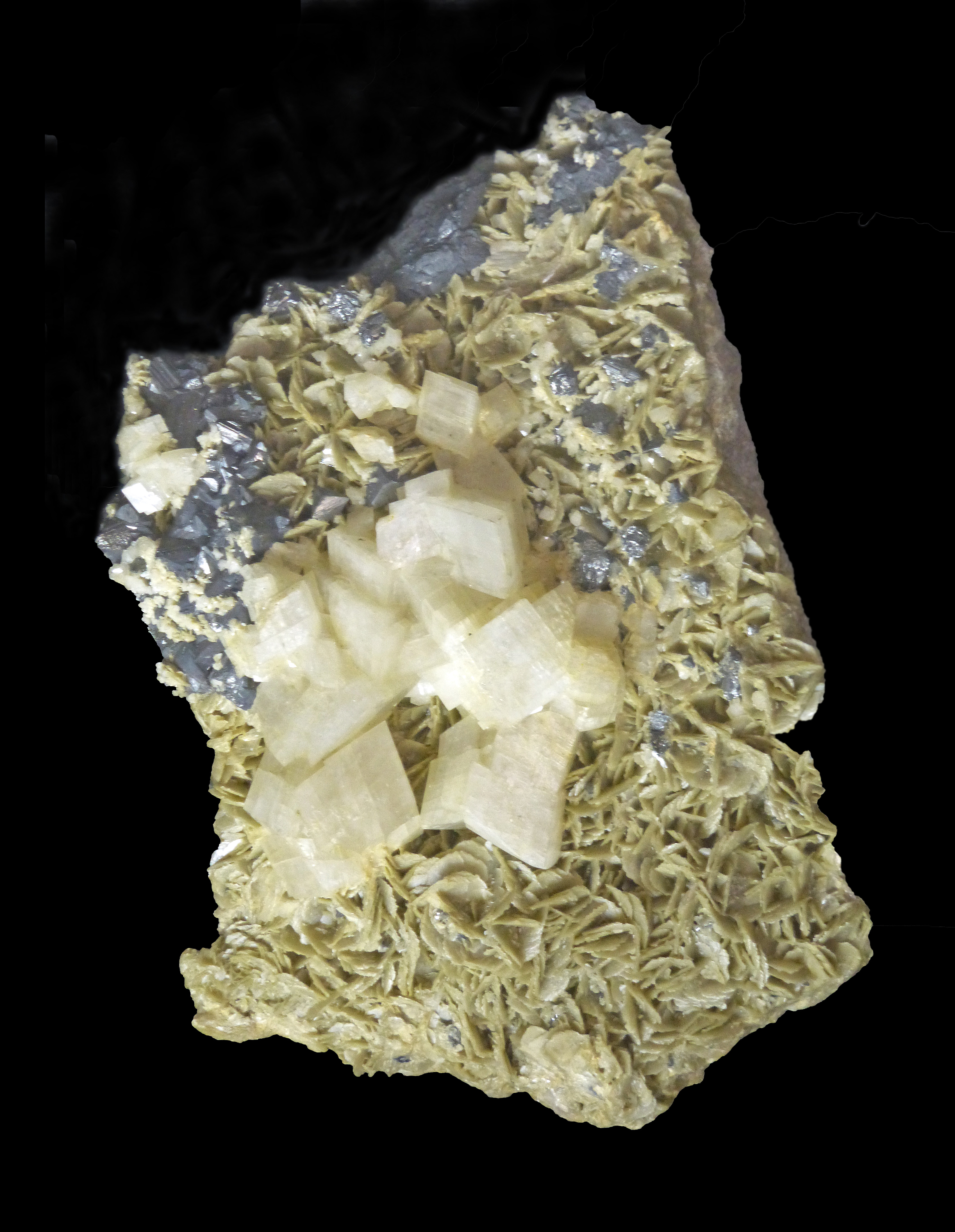 Cuivre gris, dolomite sur sidérite (Mine Saint-Sylvestre, Urbeis, Val de Villé, Bas-Rhin). Musée de minéralogie de Strasbourg